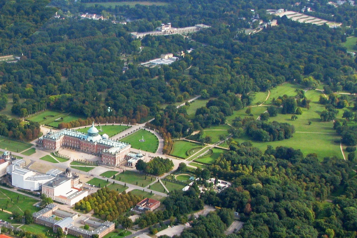 Potsdam Luftbild Park Sanssoucis Neues Palais Orangerie Schloss Sanssouci Foto Wolfgang Pehlemann Wiesbaden